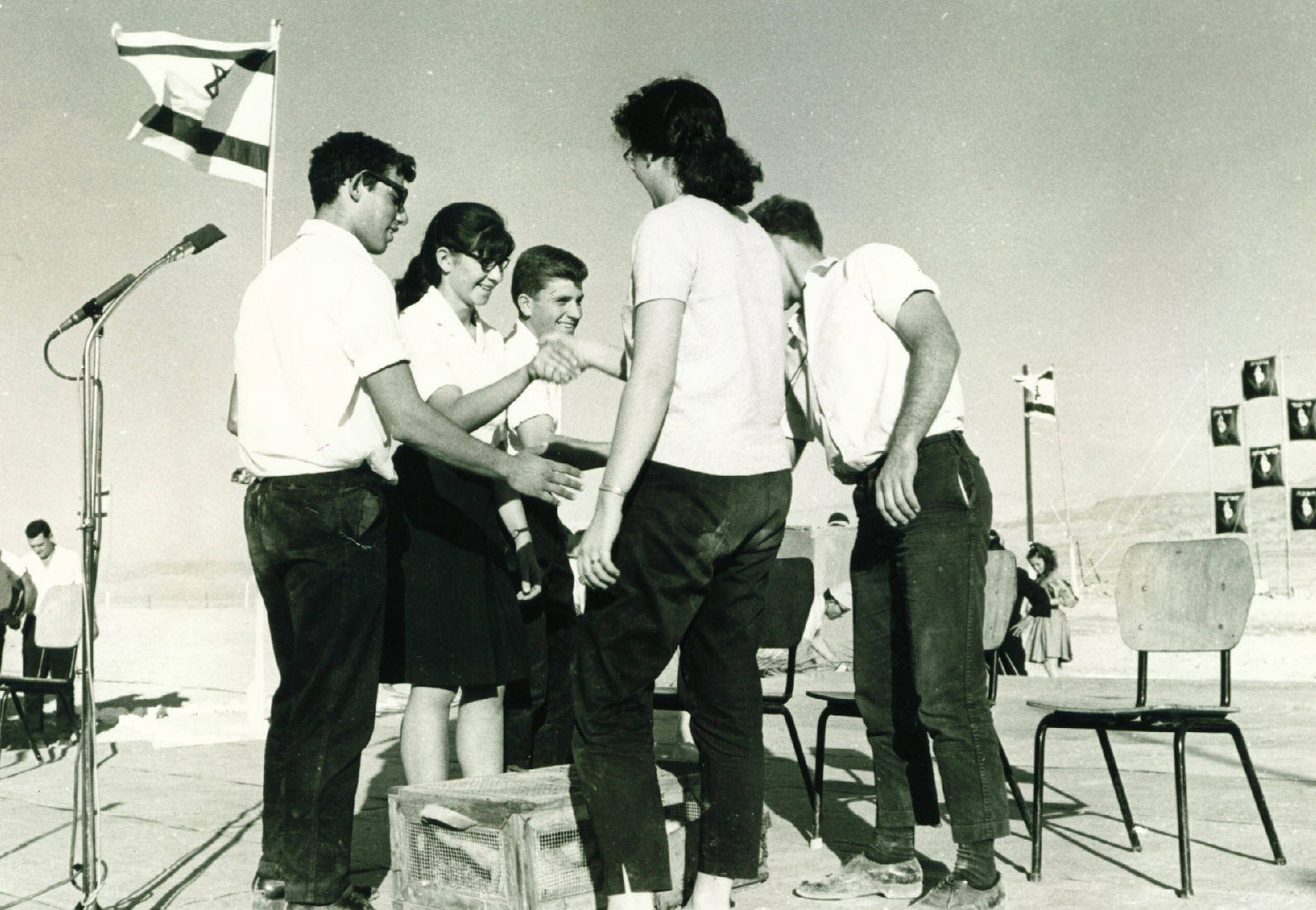 חברי הגרעין המאזרחים את גרופית נובמבר 1966